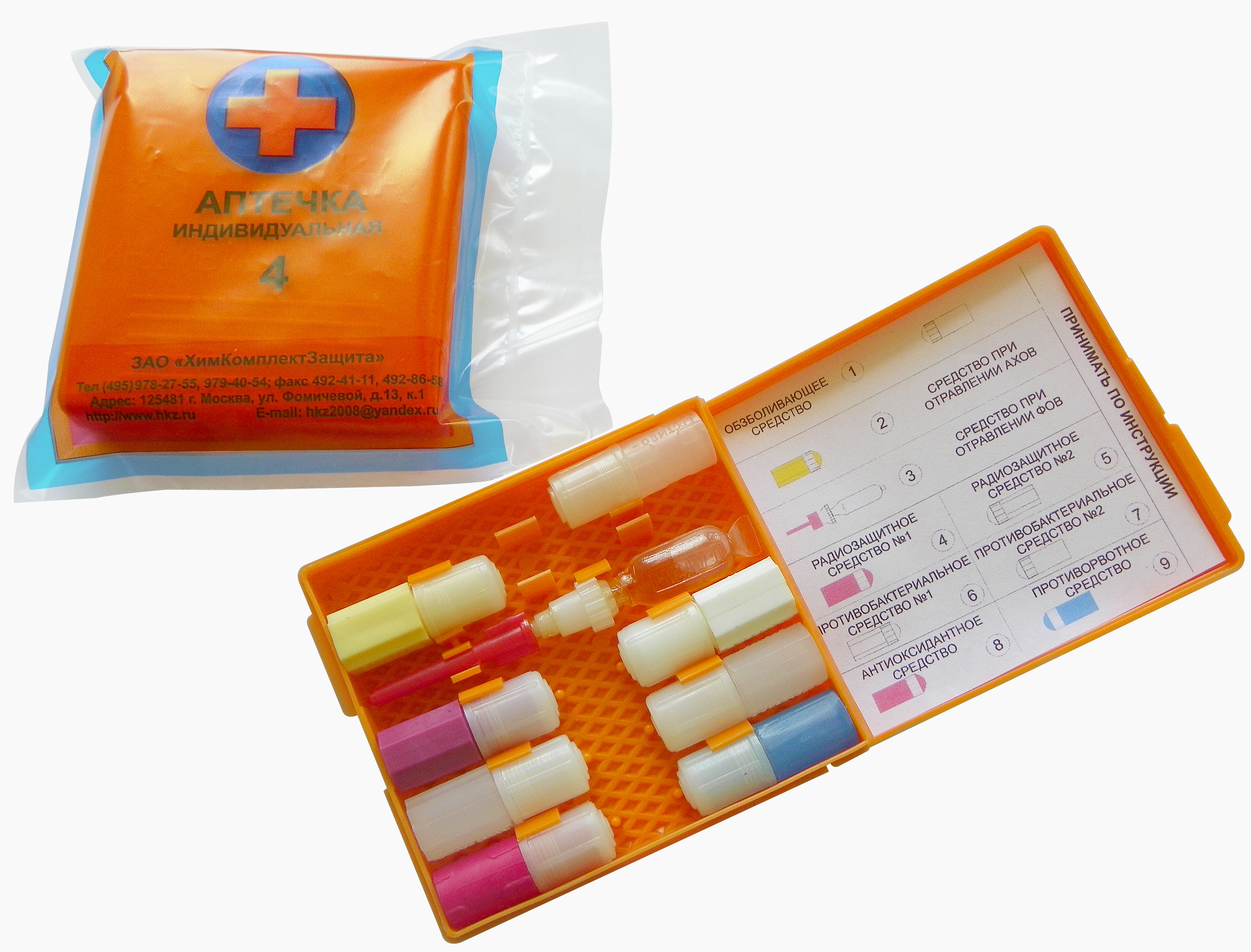 Аптечка индивидуальная АИ-4